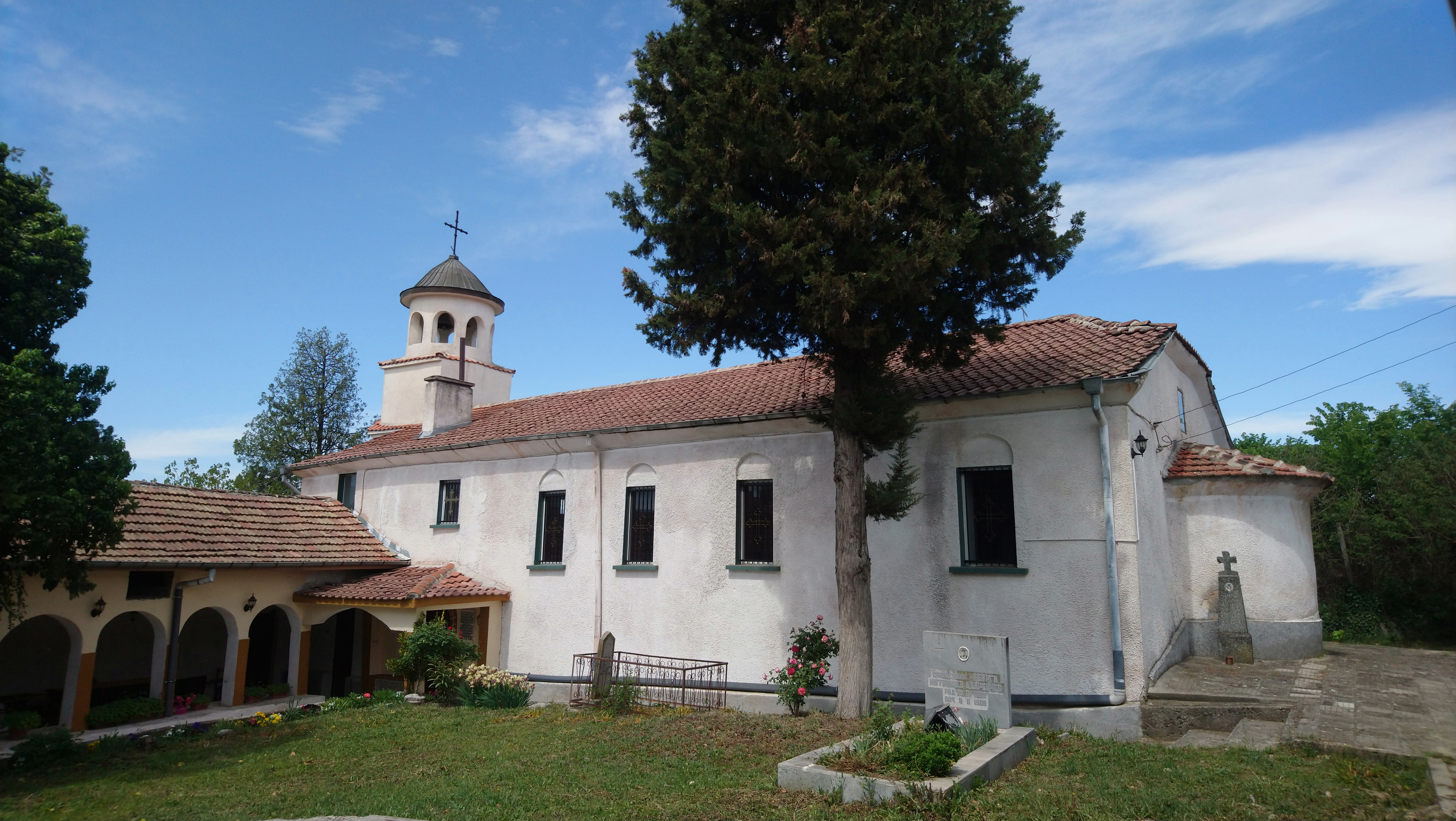 Църквата Вси Светии в село Марикостиново